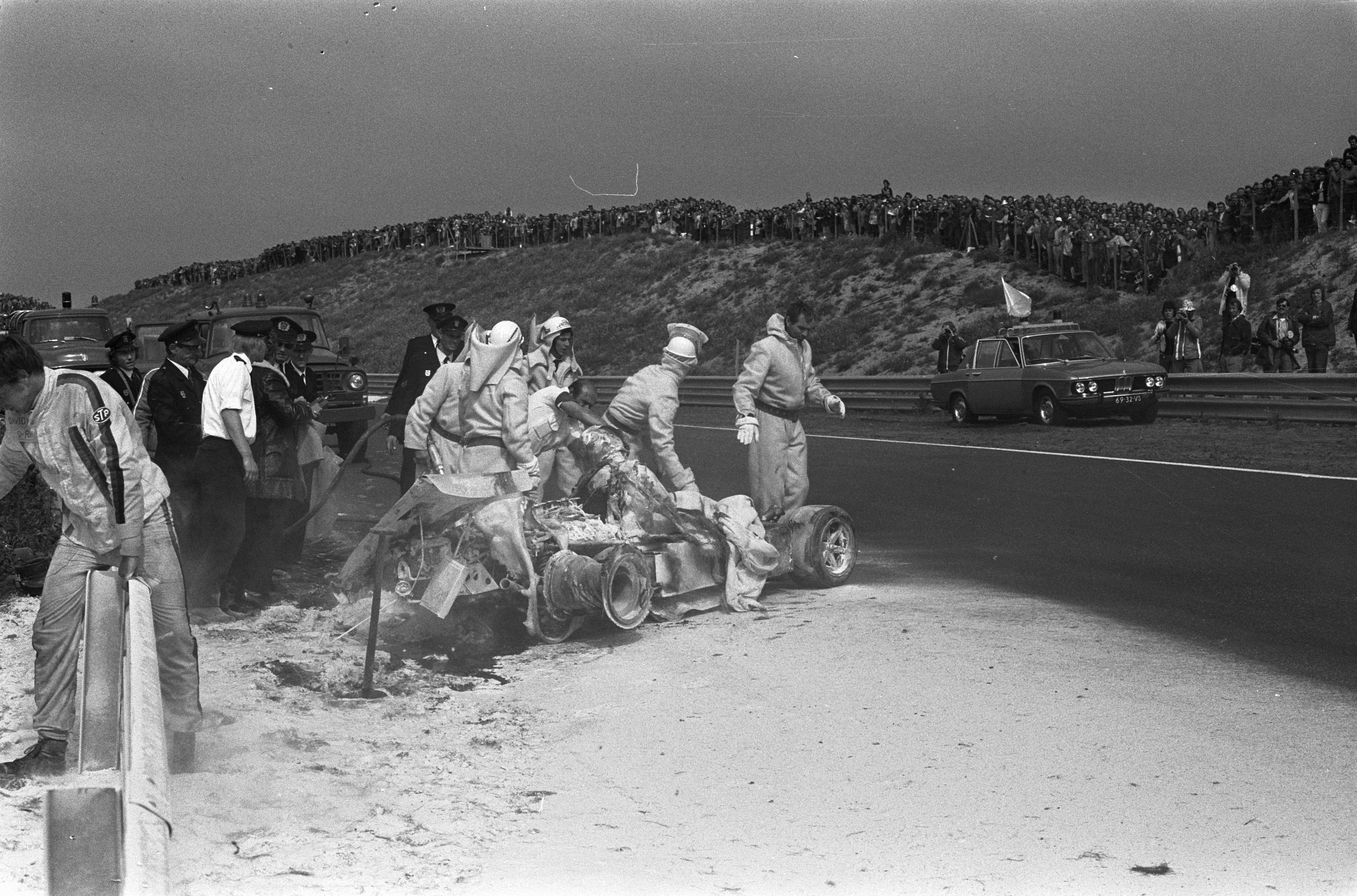 Grote Prijs van Nederland voor Formule I wagens op circuit Zandvoort, Roger Williamson verongelukt (verbrand in zijn wagen).